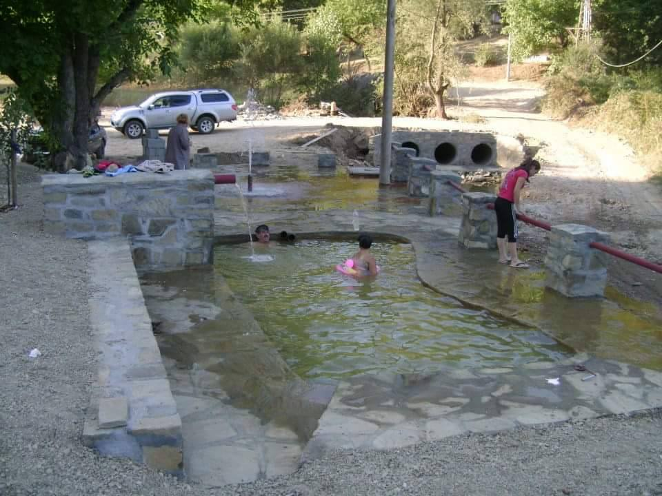 Туризам у Туларској бањи